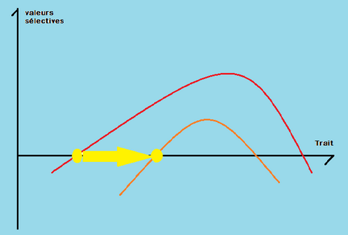 Evolution d'un trait phénotypique en fonction de sa valeur selective